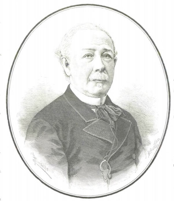 Excmo. Sr. D. Ignacio José Escobar, primer marqués de Valdeiglesias y director-propietario de «La Época». Nació en Madrid, en 1821: ✝ en la misma capital el 24 del corriente.